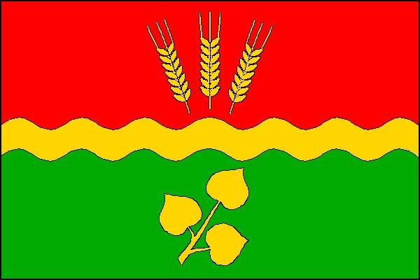 Vlajka obce Svéradice